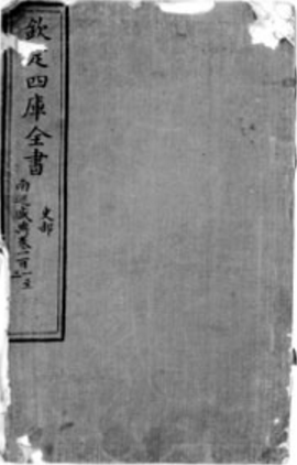 1860年，英法联军进攻北京，纵火烧毁京城西郊的皇家园林——圆明园，使它成为废墟。图为圆明园藏《四库全书》劫后残本书影。 文言: 咸豐十年，英、法卒犯華京，據圓明園，劫掠而後一焚。圖中殘書，《四庫全書》也。固藏在圓明園，禍後如是。